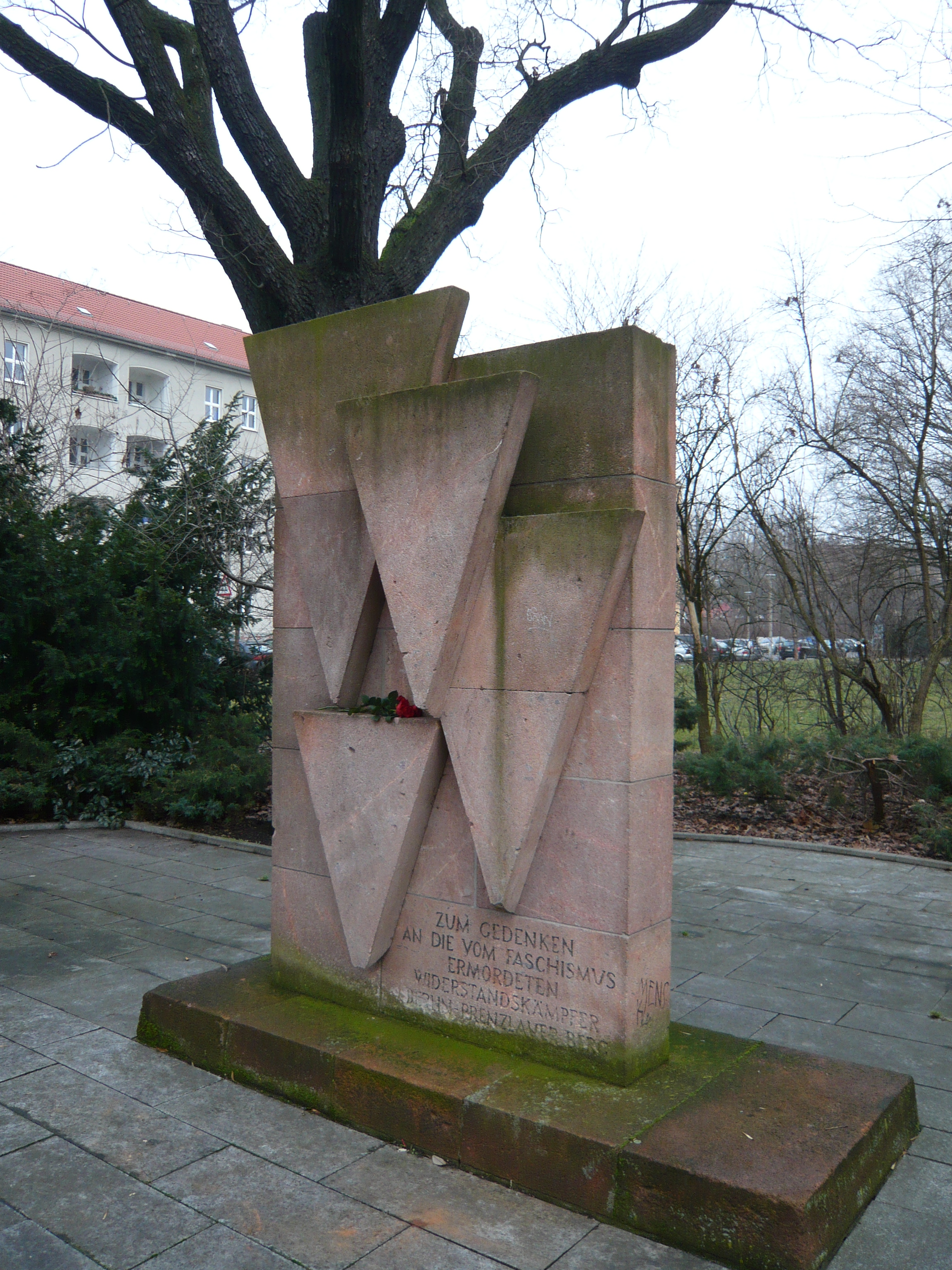 Denkmal für den Widerstandskampf in der Danziger Straße (2)